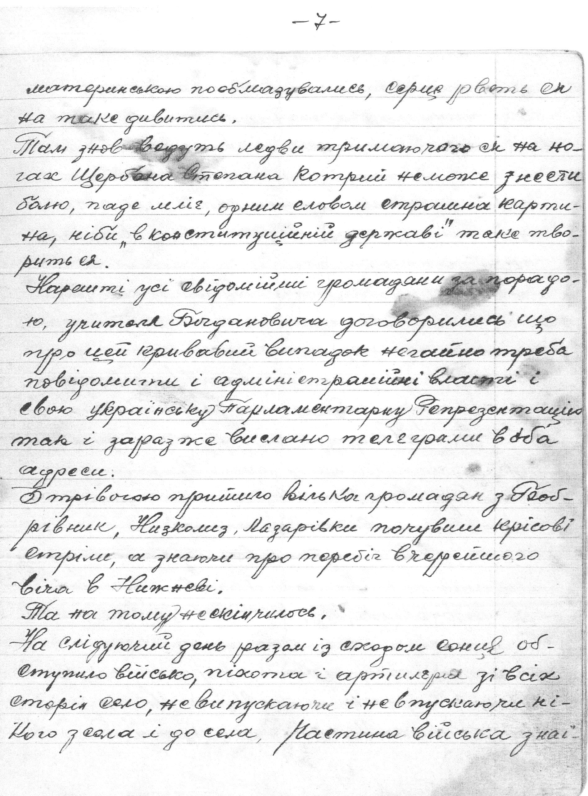 Копія рукопису